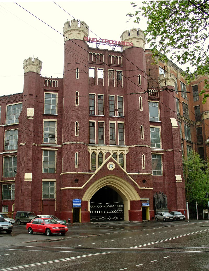 MELZ (Moscow Electric Tube Plant), Elektrozavodskaya Street, Moscow. 1900s